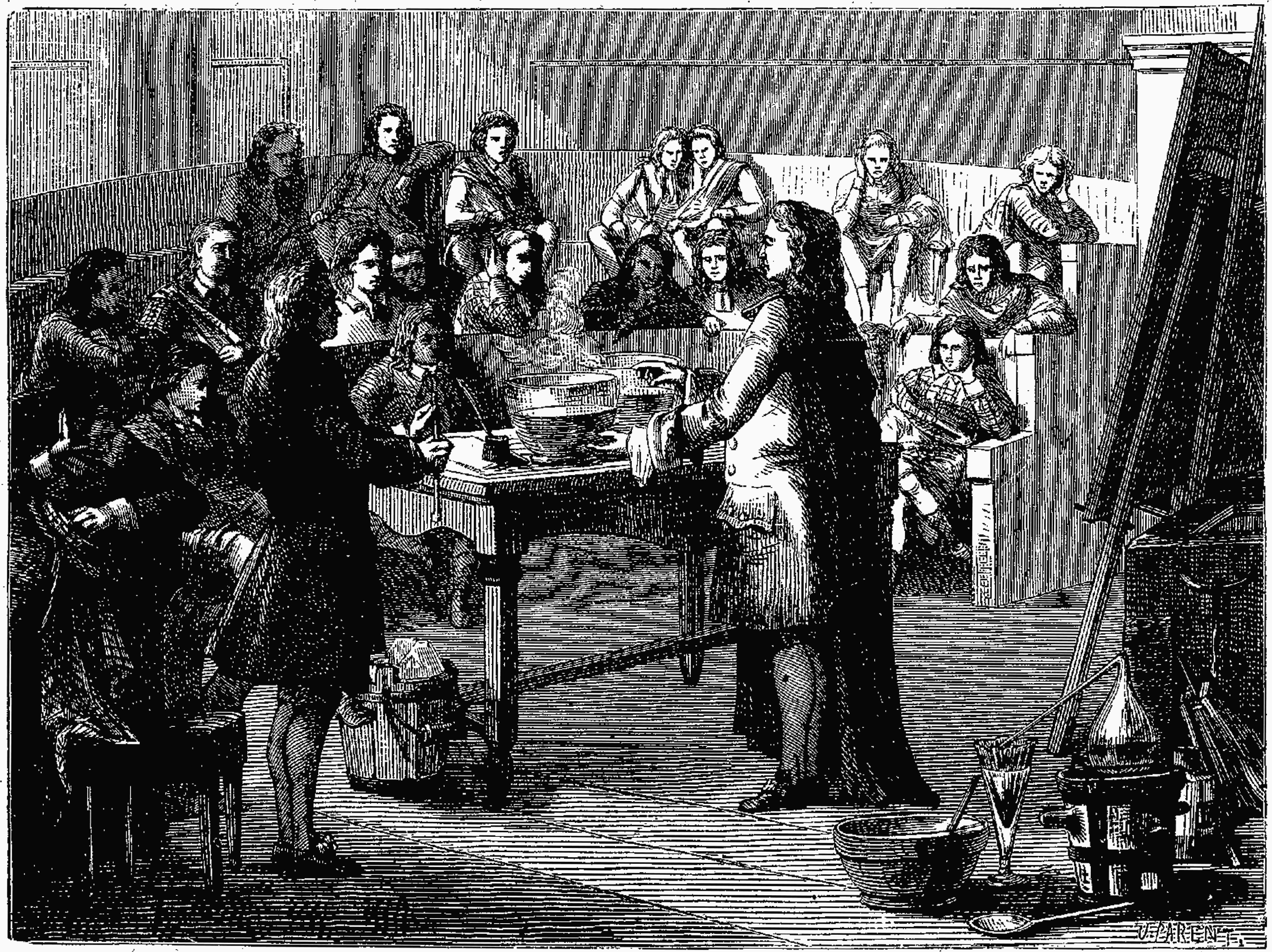 Joseph Black fait l'expérience du calorique latent devant les élèves de l'université de Glascow